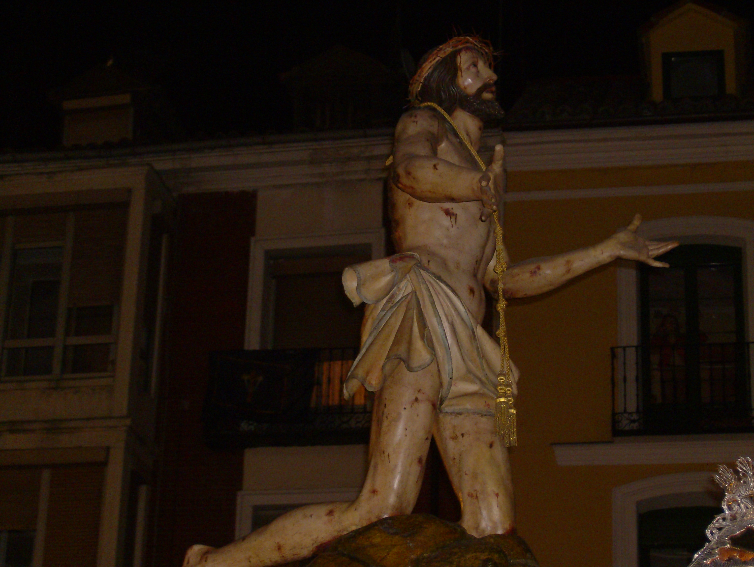 Cristo del Perdon (Bernardo del Rincon), Valladolid